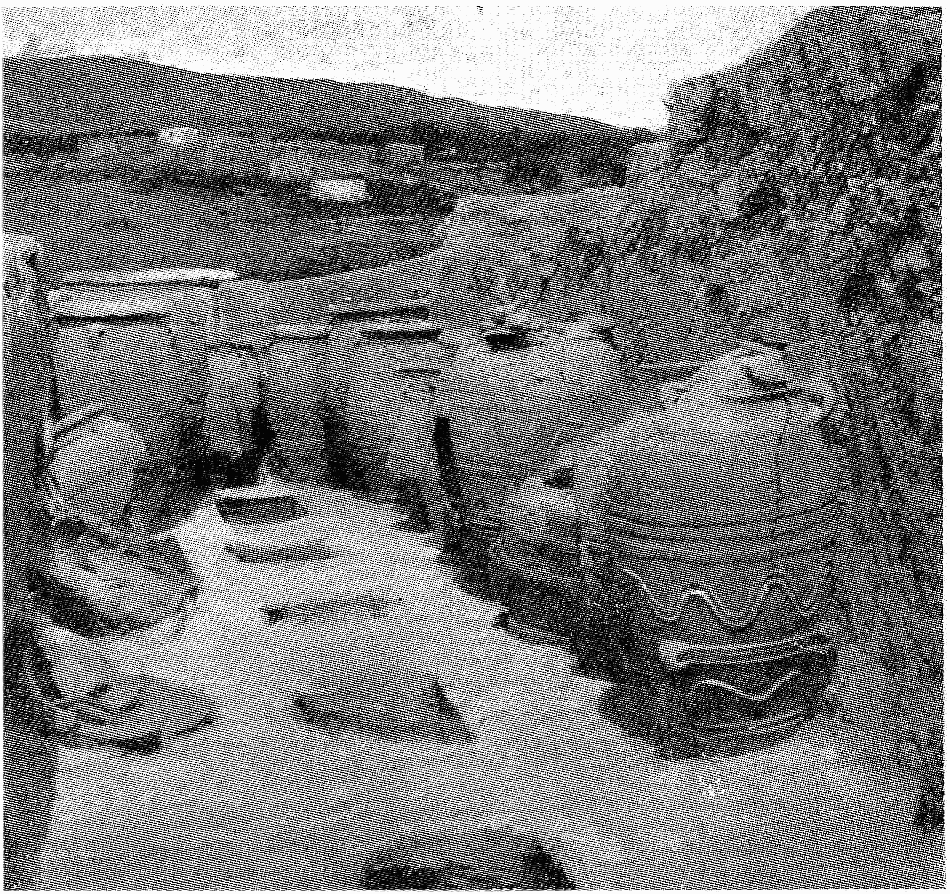 cnosse (knossos), un magasin à amphores